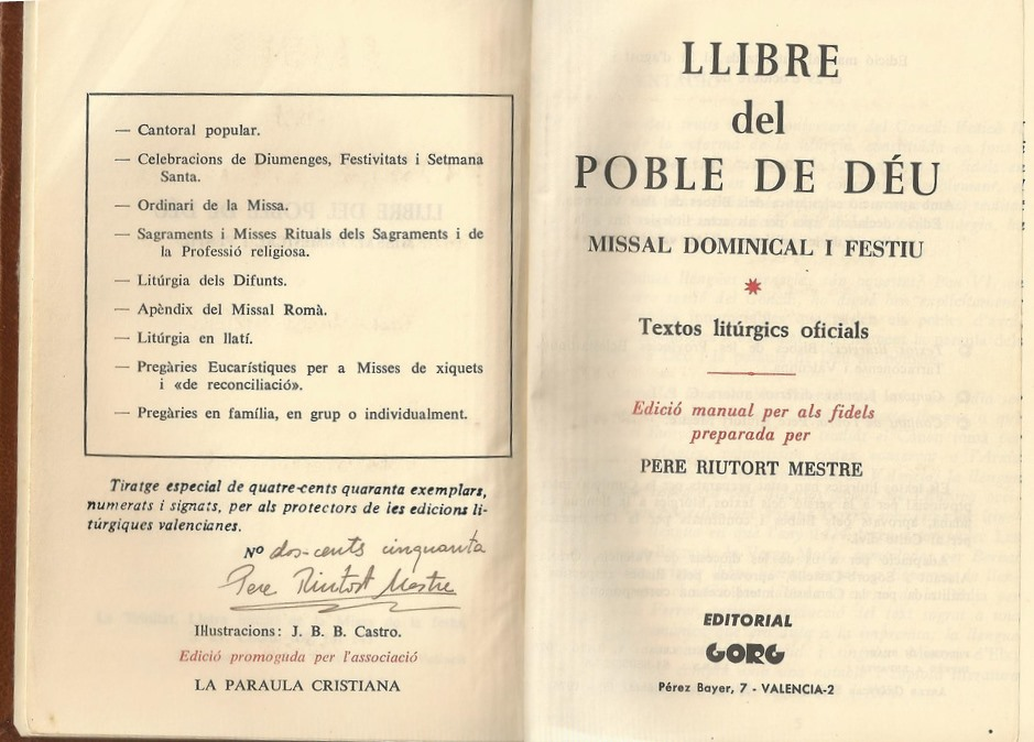 Imagen tomada el 20180308